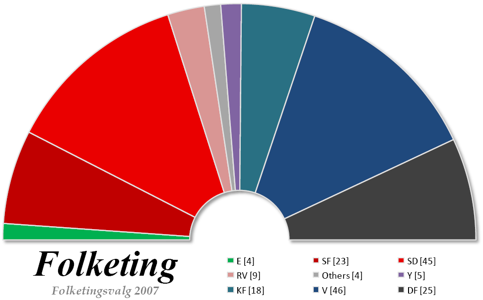 Composition du Folketing danois à l'issue des élections législatives de nov. 2007